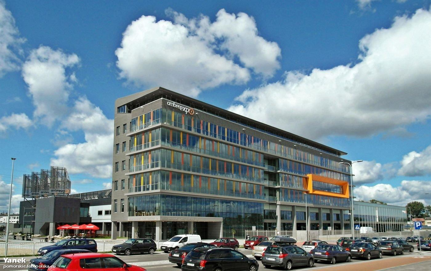 Letnica. Nowe centrum wystawowe Międzynarodowych Targów Gdańskich, AmberExpo.